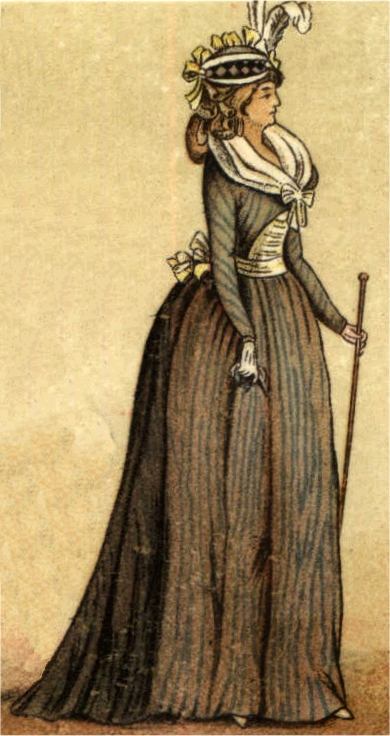 Fransyska (1794)